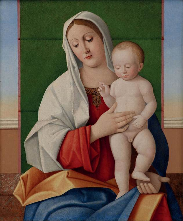 Marco Bello - Vergine con Bambino olio su tela 60 x 50 cm Collezione privata